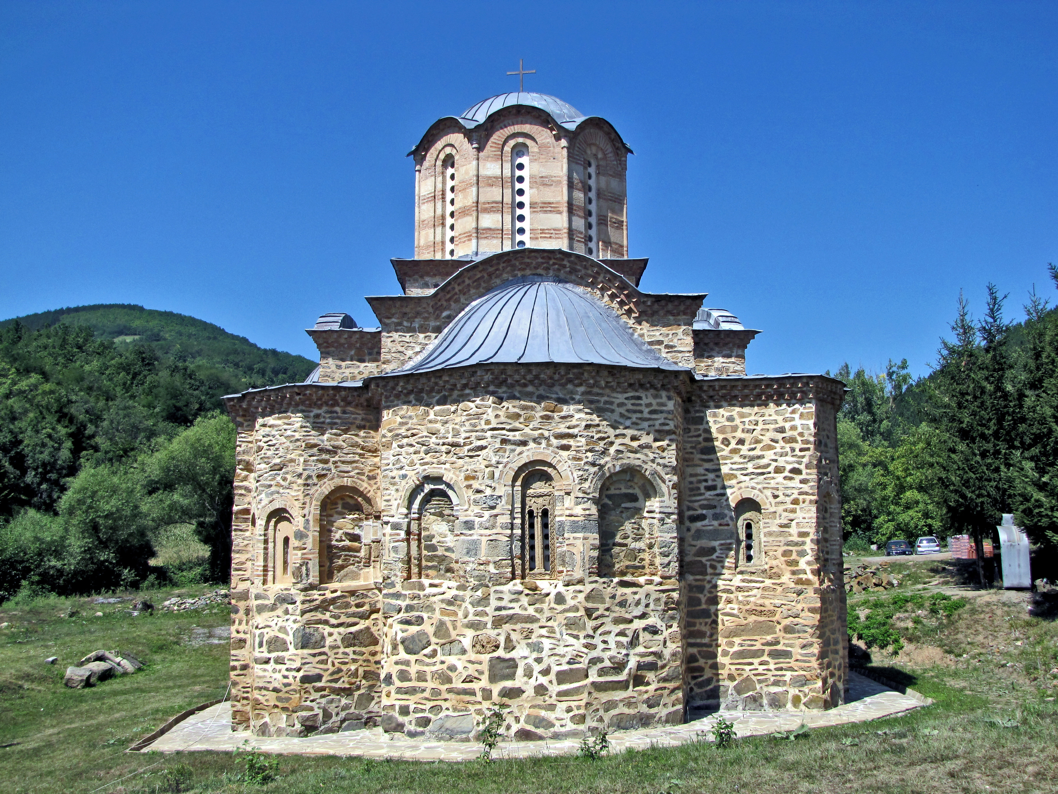 Обновљени храм Ваведења Пресвете Богородице, древног манастира Дренча, налази се неколико километара удаљен од Александровца. Основали су га монах Доротеј и његов синДанило, око 1350. године. О Дренчи се говори као мајци свих моравских цркава. Први пут се помиње у Жичкој повељи, 1382. године. Припада групи раних моравских споменика. Била је дворска црква кнеза Лазара у доба зидања Лазарице. Турци су је разрушили одмах после Косовског боја и на рушевинама побили заробљени народ. Због зле судбине зову је и Душманица, мада се сматра да се ради о изворном имену ктитора.